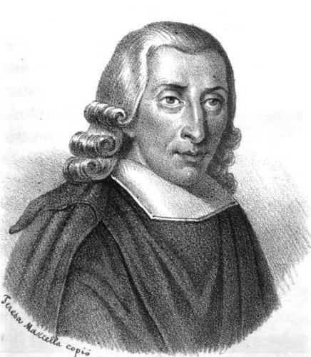 "Giacinto Mar[ches]e Dragonetti, già presidente della gran c[or]te cassazione".